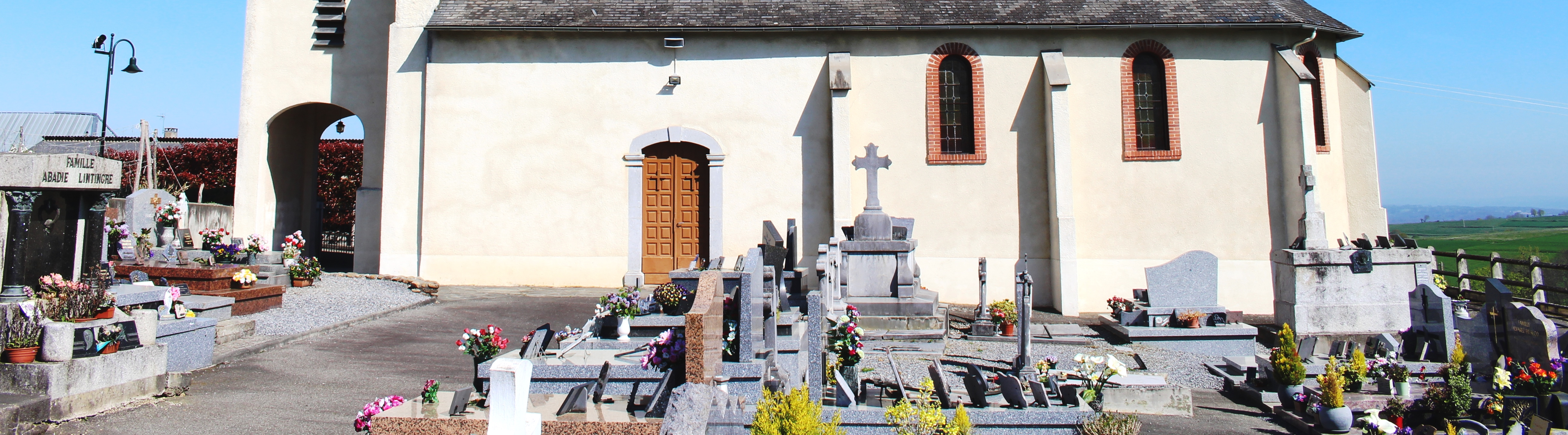 Cimetière de Hitte (Hautes-Pyrénées)